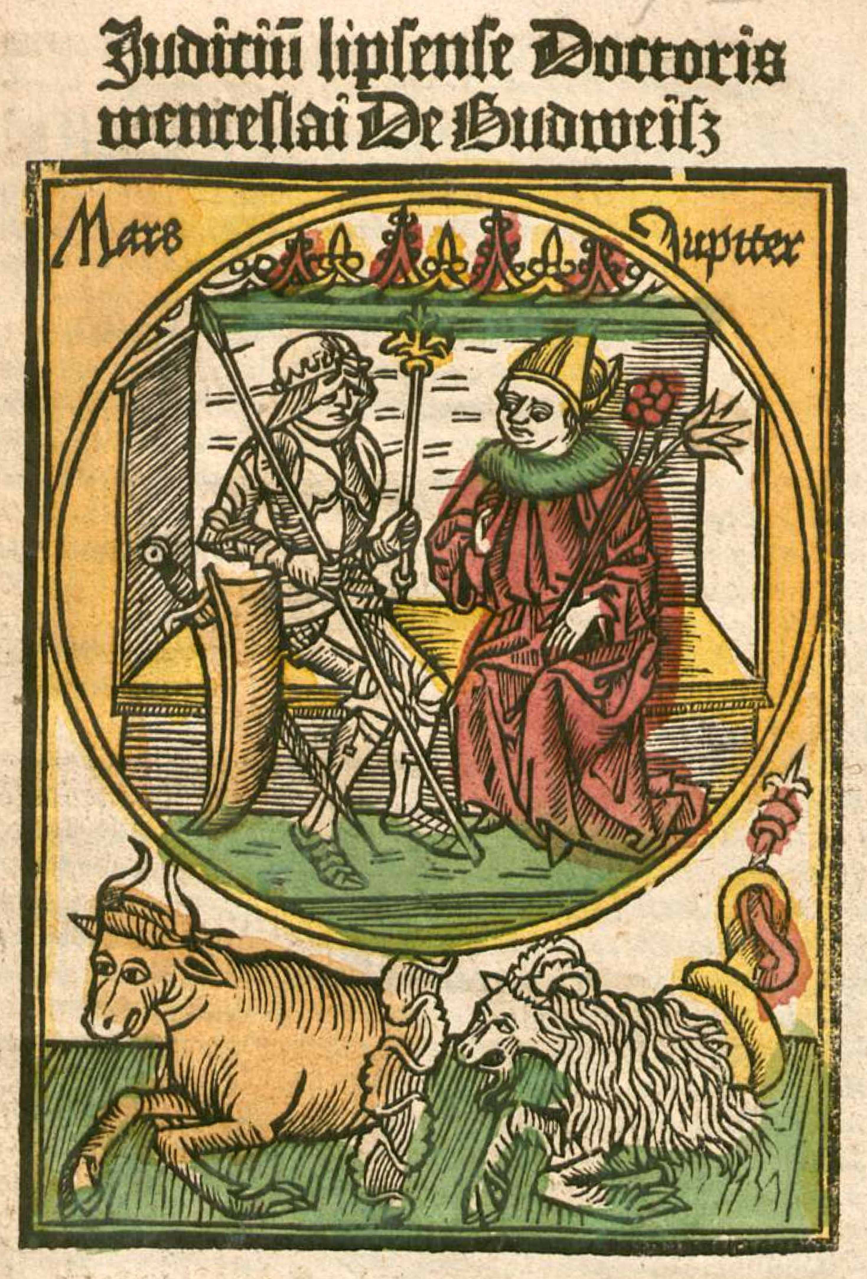 Iudicium Lipsense, [Leipzig], [ca. 1497/98] [BSB-Ink F-20GW 9621]